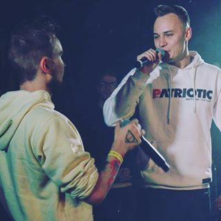 Mateusz Kaniowski i Bober na WBW 2019